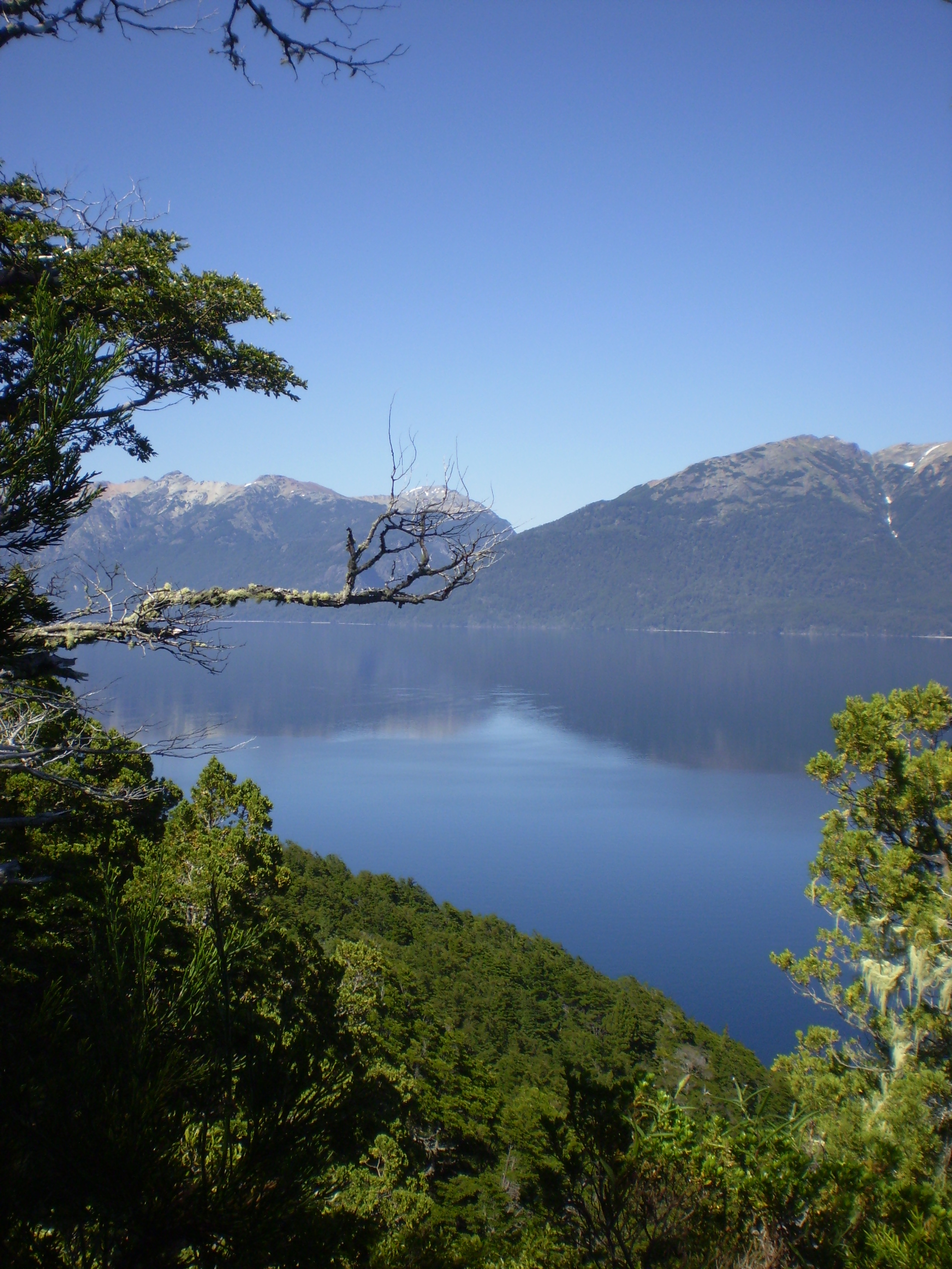 (vista desde el mirador occidental de la península de Quetrihué) Villa La Angostura, Neuquén, Argentina